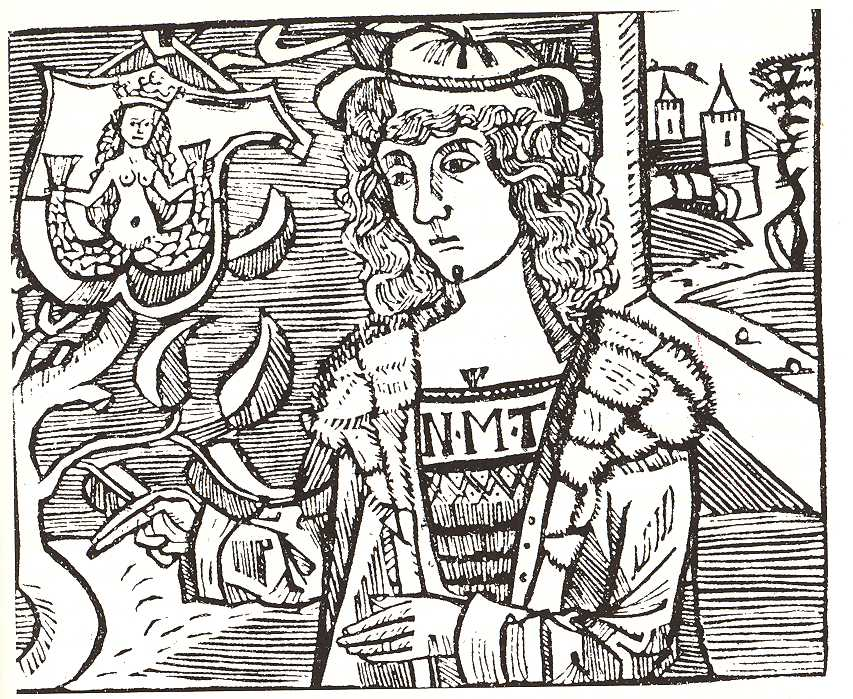 Nicolaus Marschalk, Humanist, in einem zeitgenössischen Holzschnitt des 16. Jahrhunderts